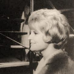 Fotografía en blanco y negro sobre papel fotográfico semimate. Escena de la película "Un viaje al más allá" donde aparece Cristina Berys de perfil derecho, sonriendo. La fotografía fue girada horizontalmente para que quede mirando hacia el interior del artículo (y no hacia fuera).